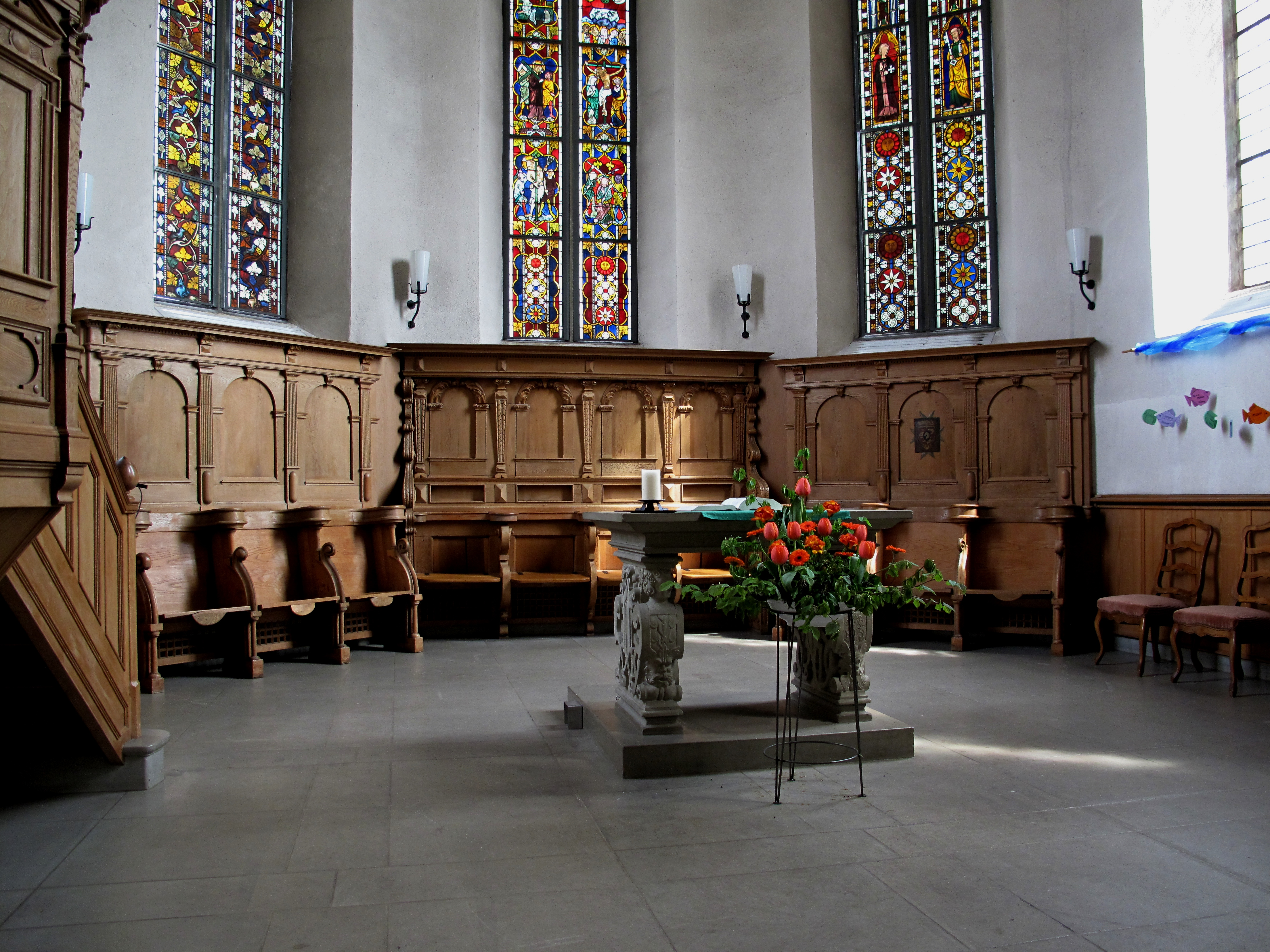 Münchenbuchsee, Kirche, Chor.